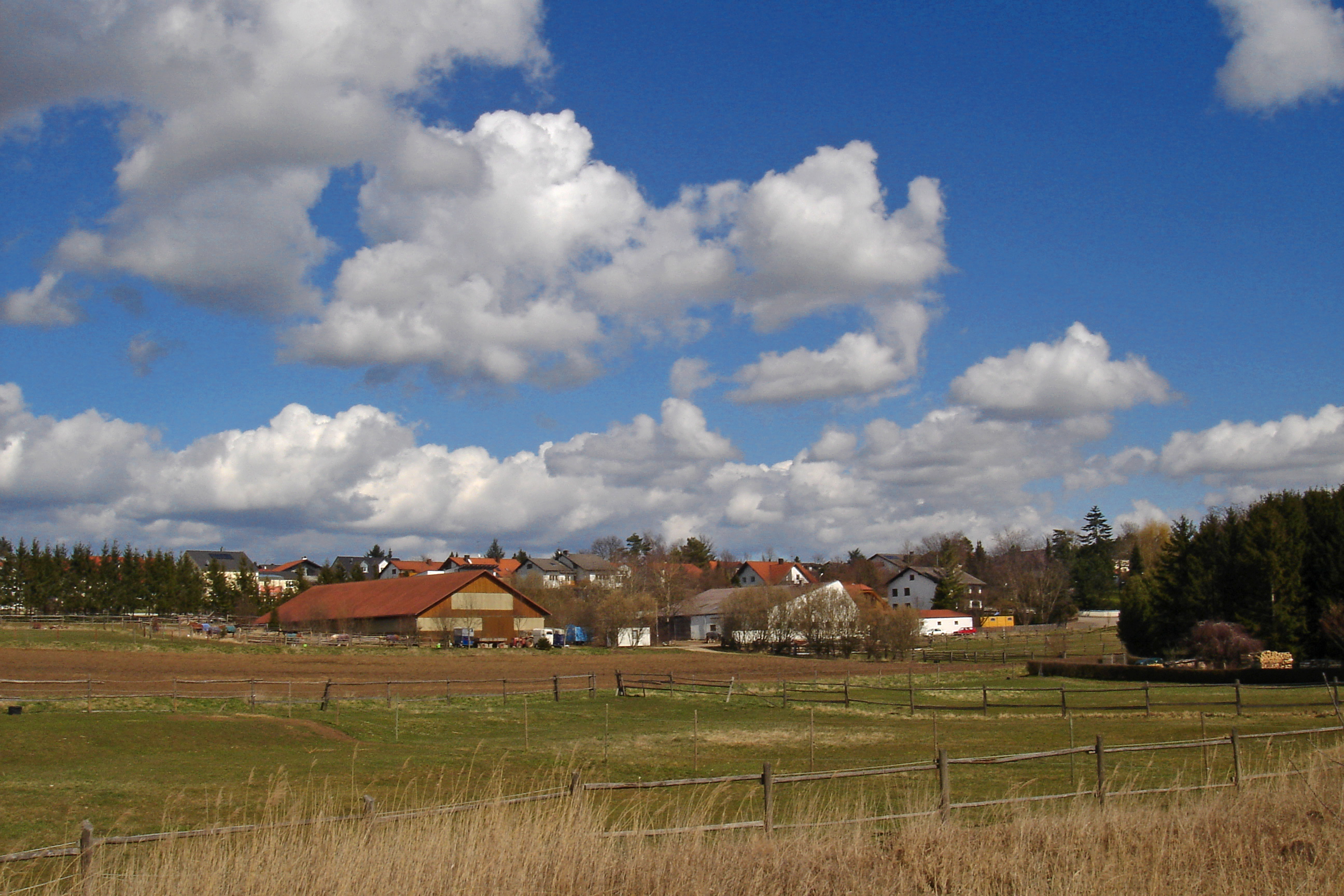 Lenting, Ansicht von Südwest